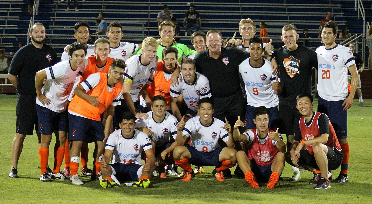 王者FCトゥーソンを破る大金星をあげたサンディエゴゼストFCメンバー。